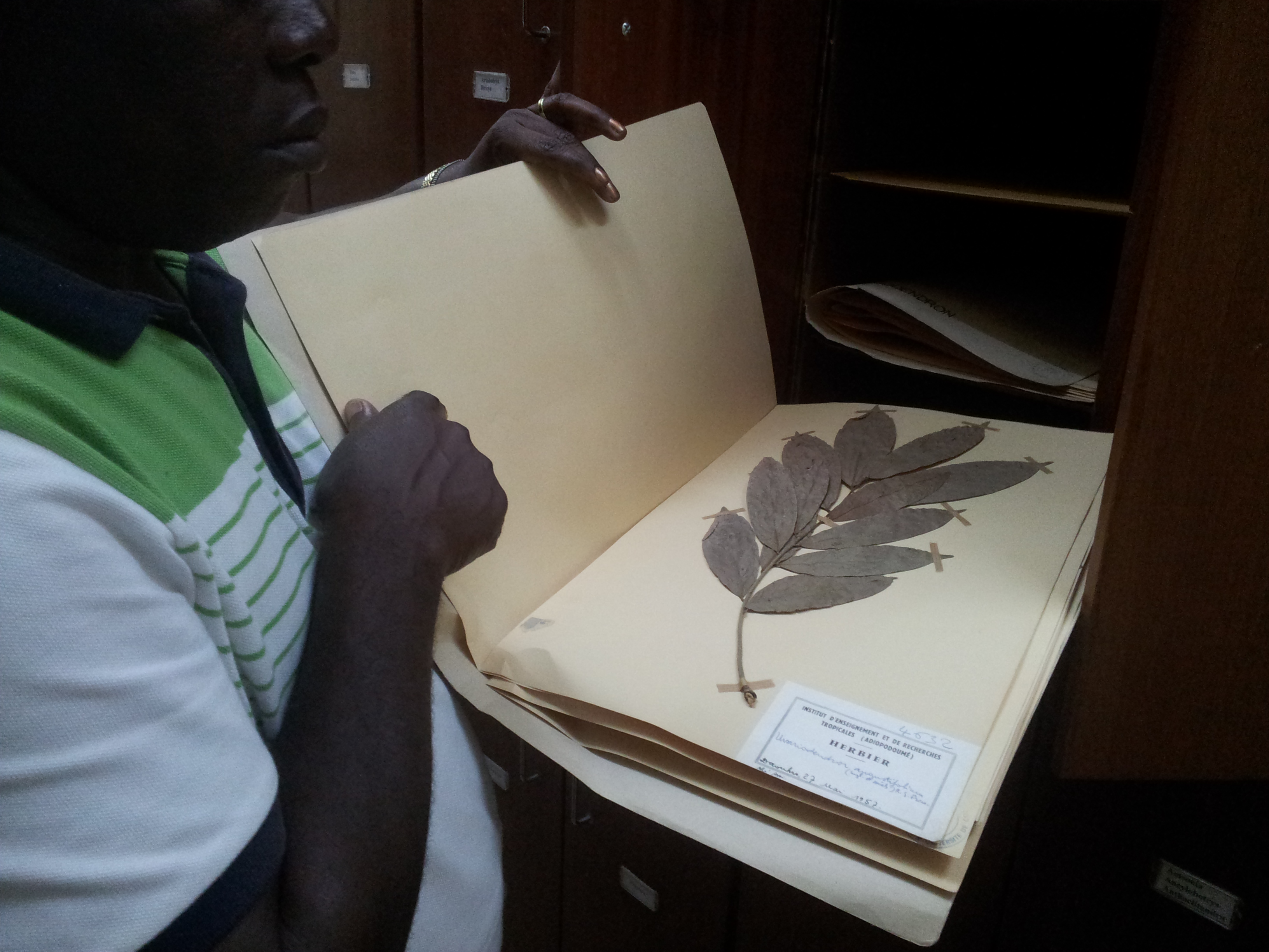 Un chercheur en botanique montre un spécimen à l'herbier de l'Université Félix-Houphouët-Boigny This is an image of "African people at work" from Ivory Coast